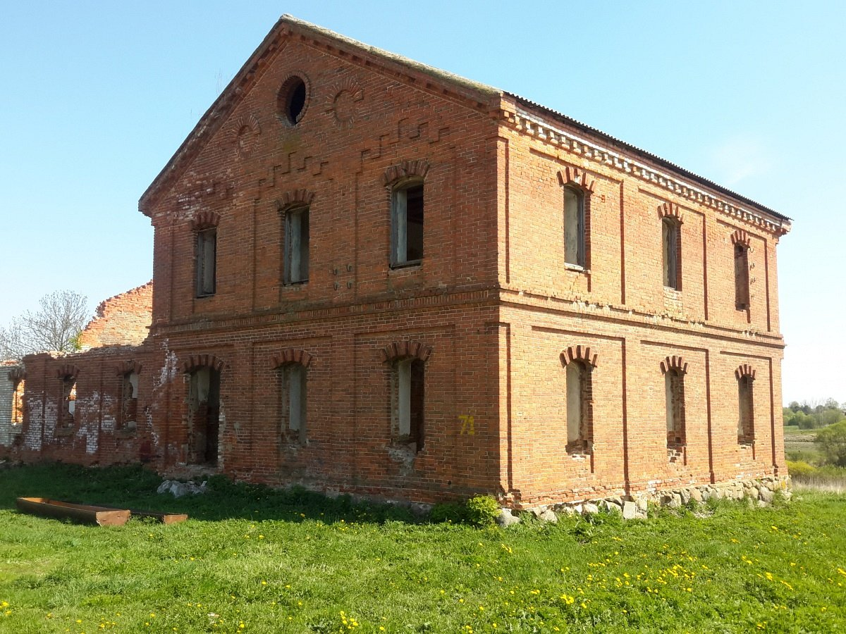 Іванск. Сядзіба Валадковічаў. Флігель